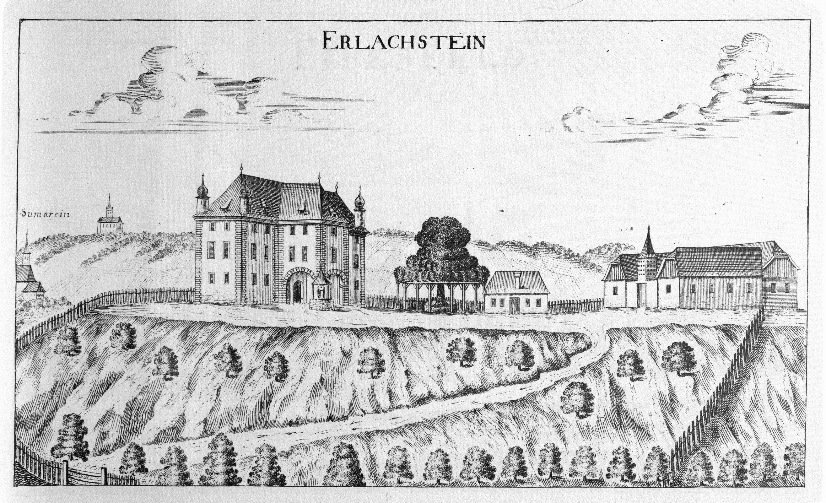 G. M. Vischers Käyserlichen Geographi, Topographia Ducatus Stiriae, Das ist: Eigentliche Delineation / und Abbildung aller Städte / Schlösser / Marcktfleck / Lustgärten / Probsteyen / Stiffter / Clöster und Kirchen / so es sich im Herzogthumb Steyrmarck befinden; Und anjetzo Umb einen billichen Preyß zu finden seynd Bey Johann Bitsch Universitäts Buchhandlern / Auff dem Juden=Platz bey der guldenen Saulen. Graz 1681 Die Nummerierung der Dateien folgt der alphabetischen Reihung der Orte